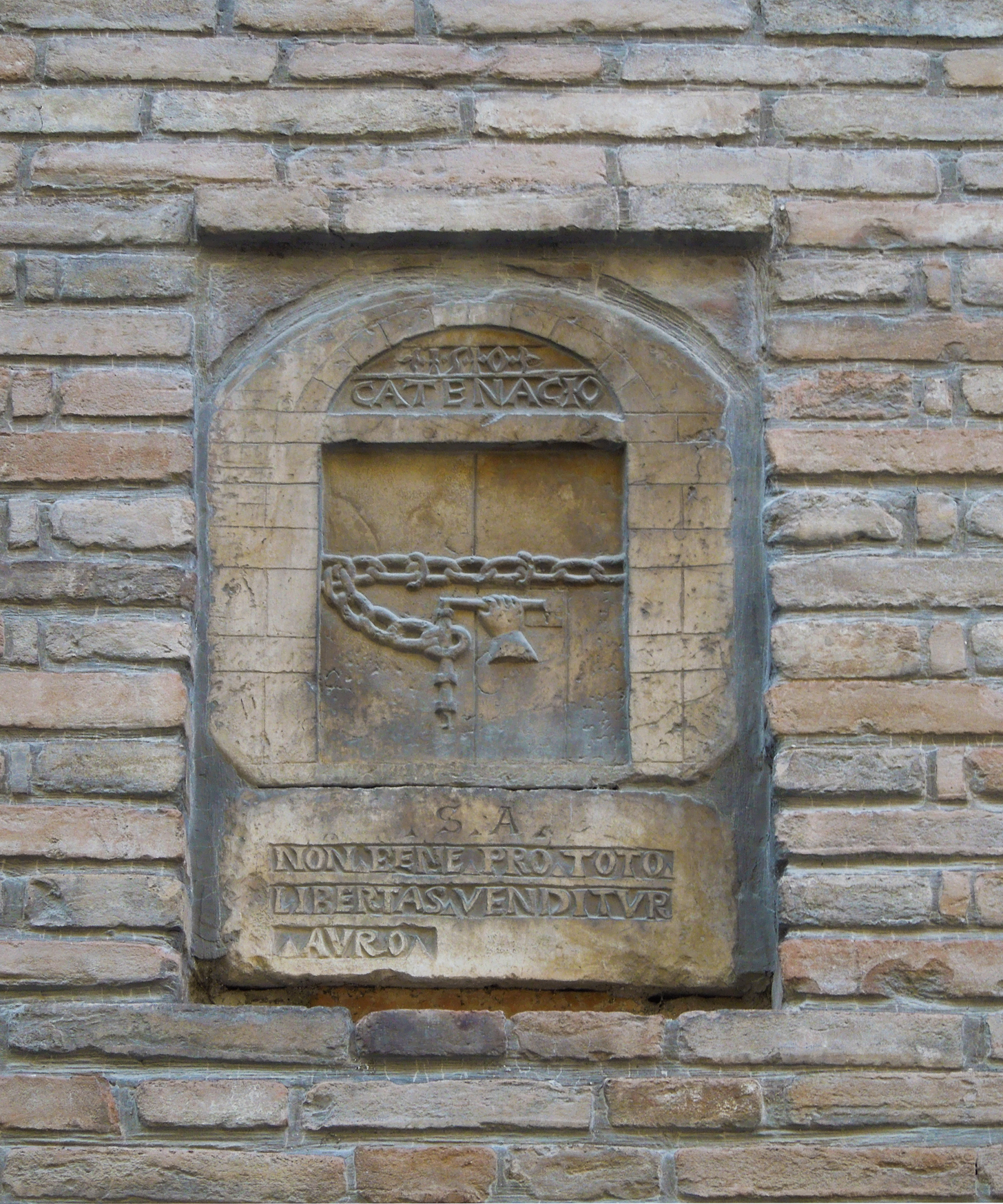 Elemento lapideo murato sulla facciata dell’edificio di Casa Catenacci, in Via Vittorio Veneto a Teramo. L'emblema, datato 1510, riporta scolpita l'epigrafe “S.A. NON BENE PRO TOTO LIBERTAS VENDITUR AURO”, ossia: "La libertà non si vende per tutto l’oro del mondo."